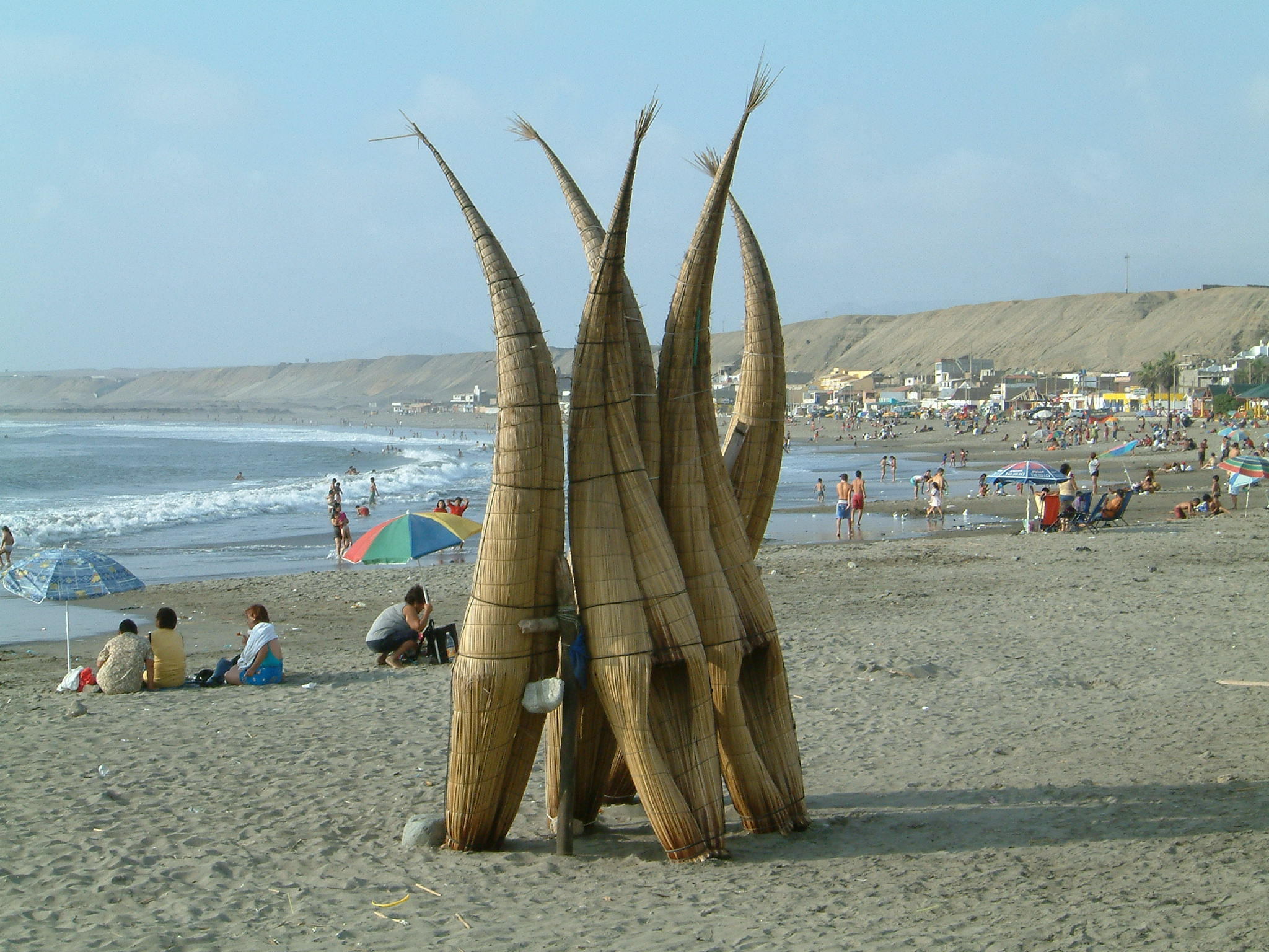 Caballitos de totora en Huanchaco Picture taken 7-01-2003 by Allard Schmidt from The Netherlands